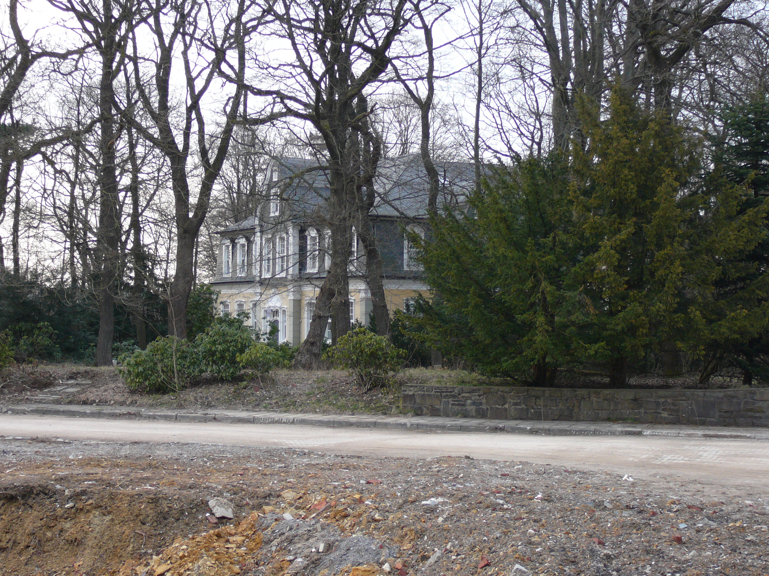 Villa Braus, Parkstr, Wuppertal